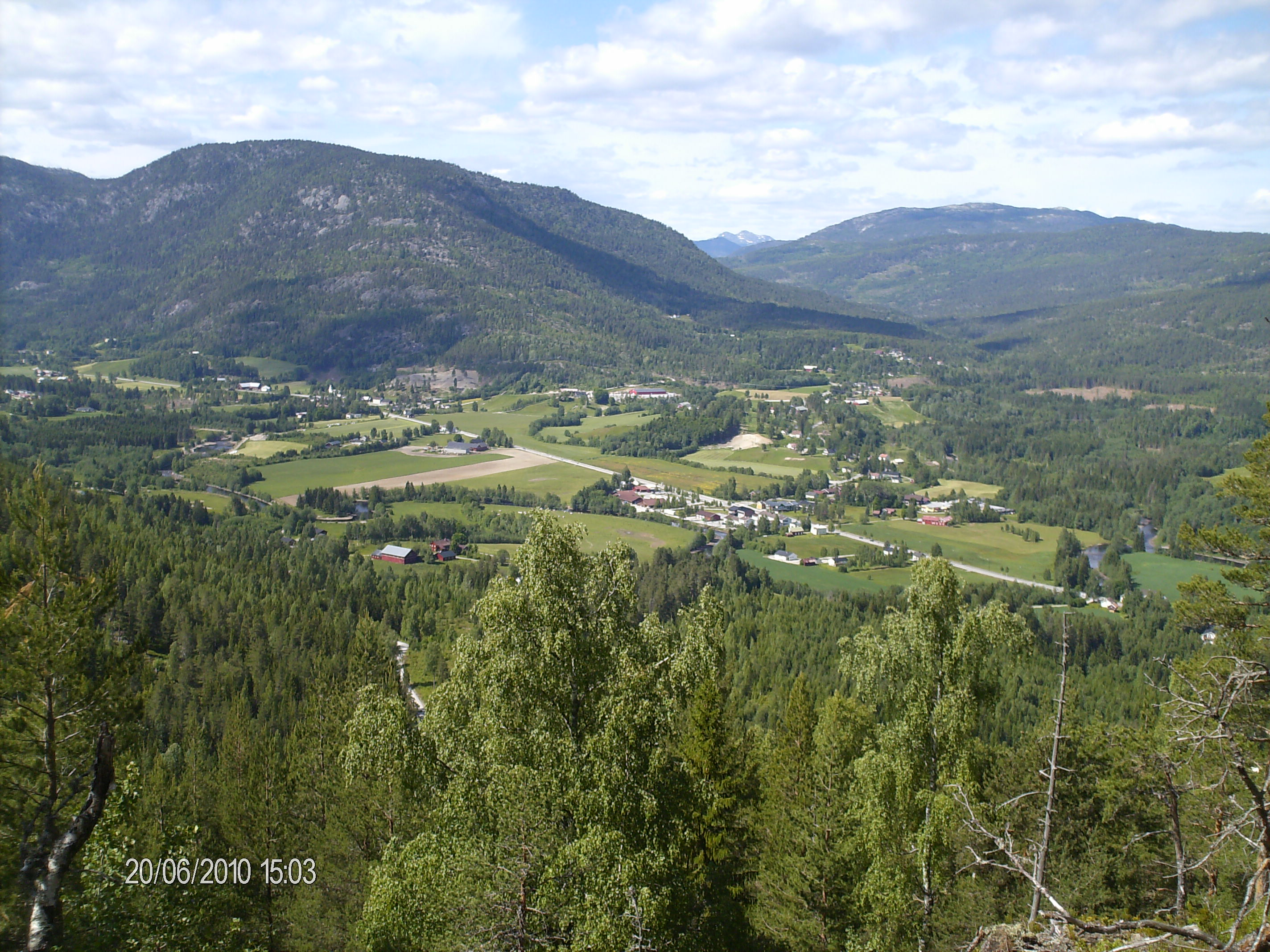 Sauland Sentrum